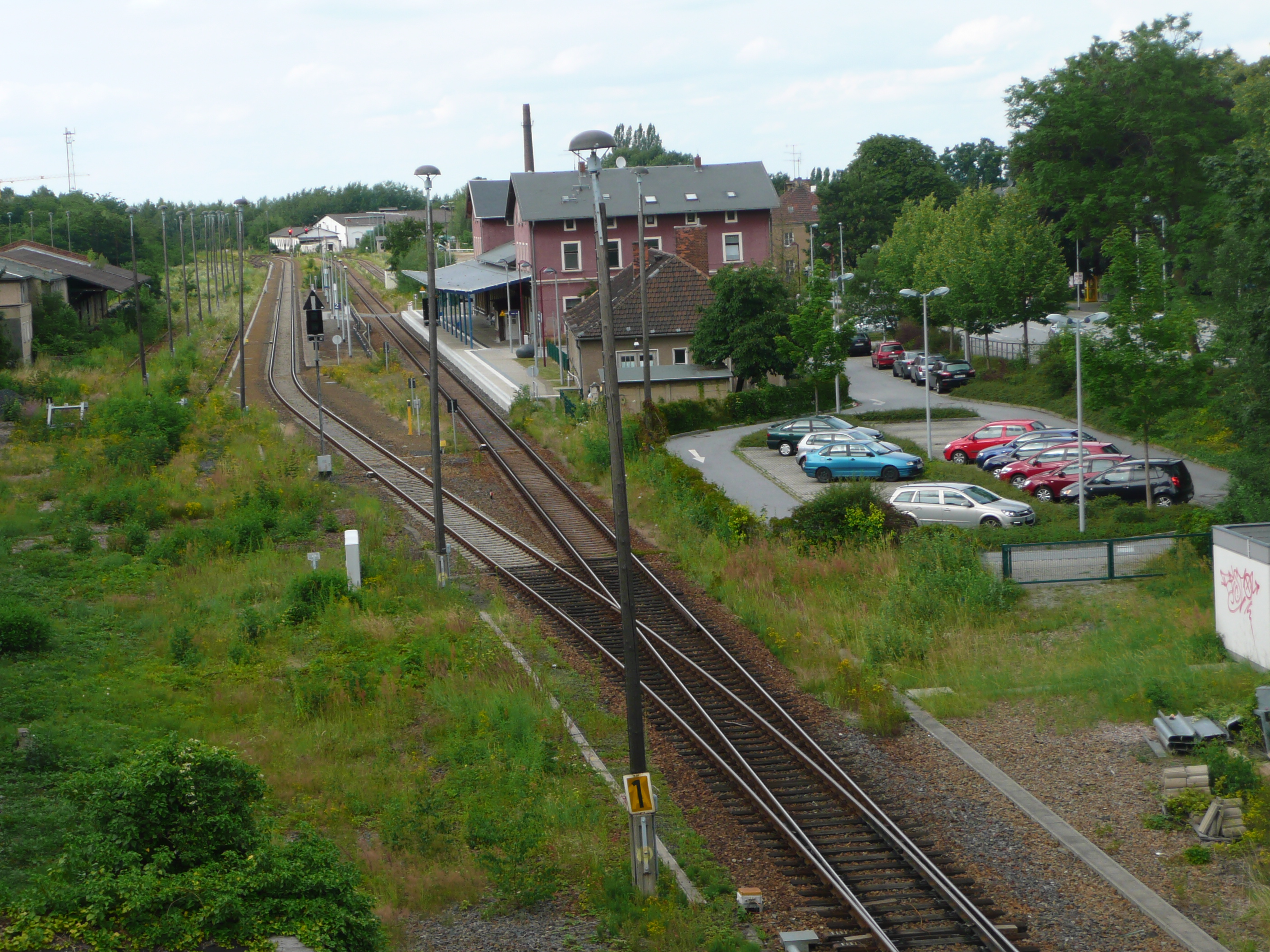 Ansicht des Bahnhofes Kamenz von dem Stadttunnel im Jahr 2015